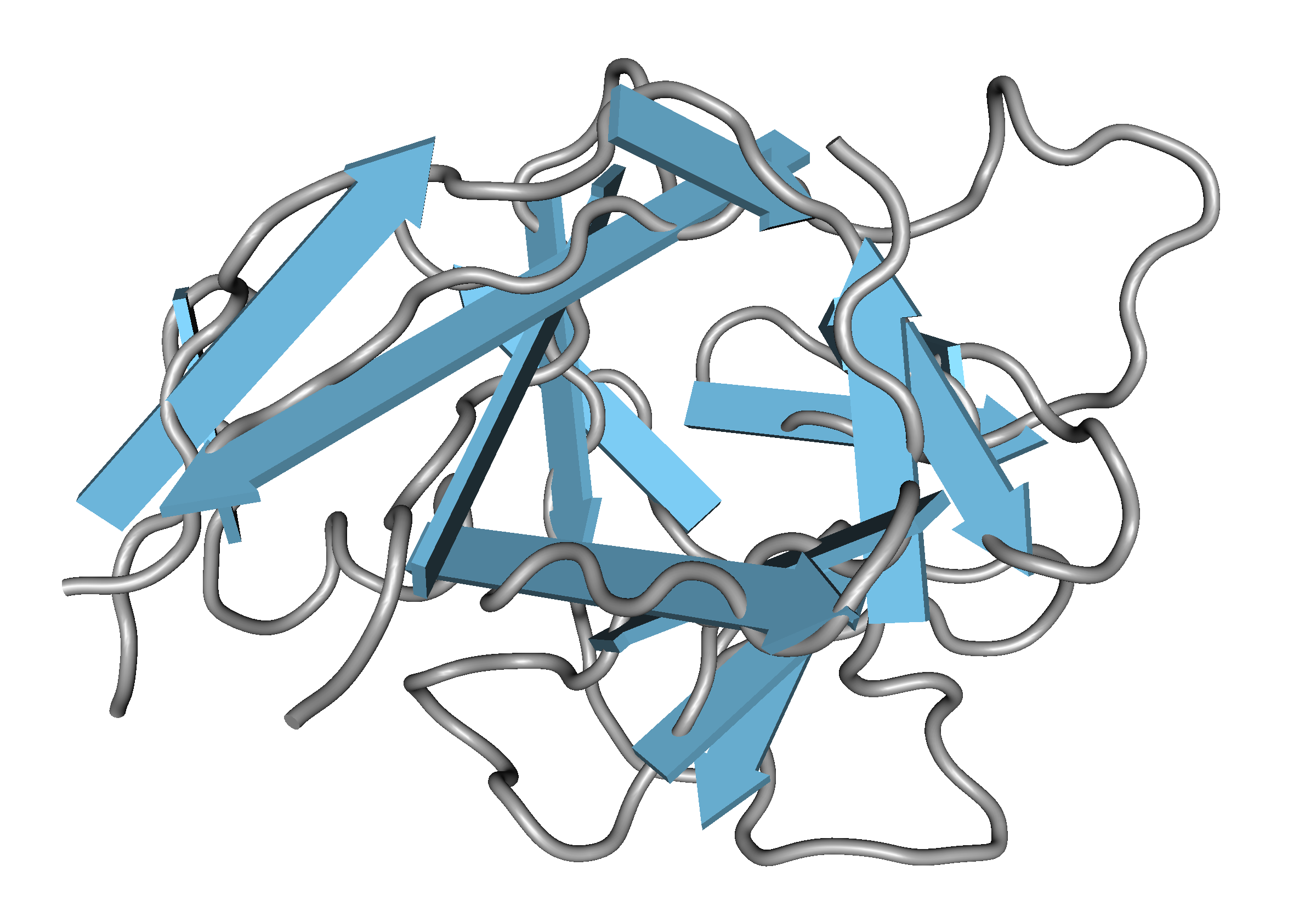 2ILA Interleukin 1 Alpha